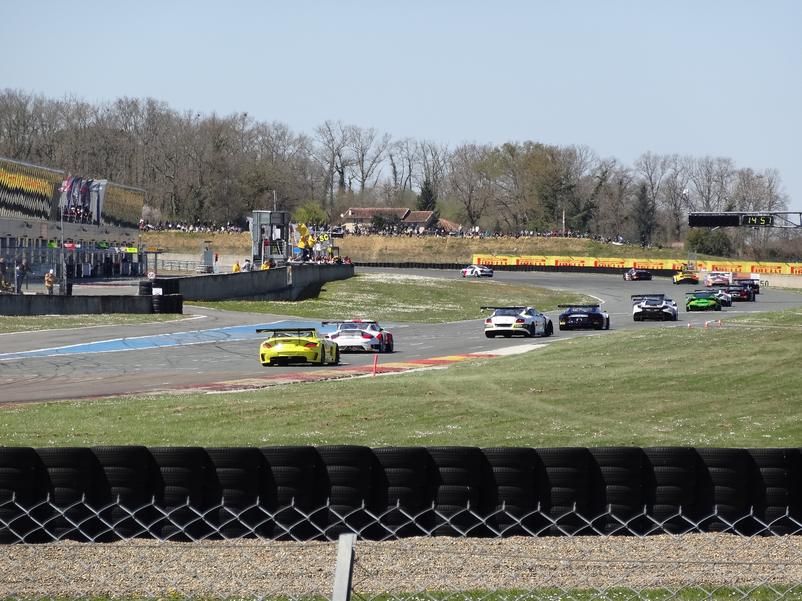 Blancpain Sprint Series 2015, sur le Circuit Paul Armagnac à Nogaro